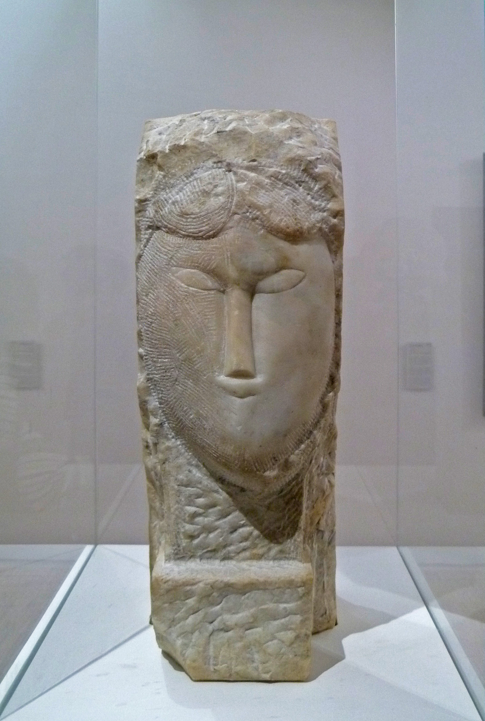 "Tête de femme" (Head of a woman) (ca. 1913); white marble by Amedeo Modigliani: Musée d'art moderne, d'art contemporain et d'art brut; Villeneuve d'Asq, France